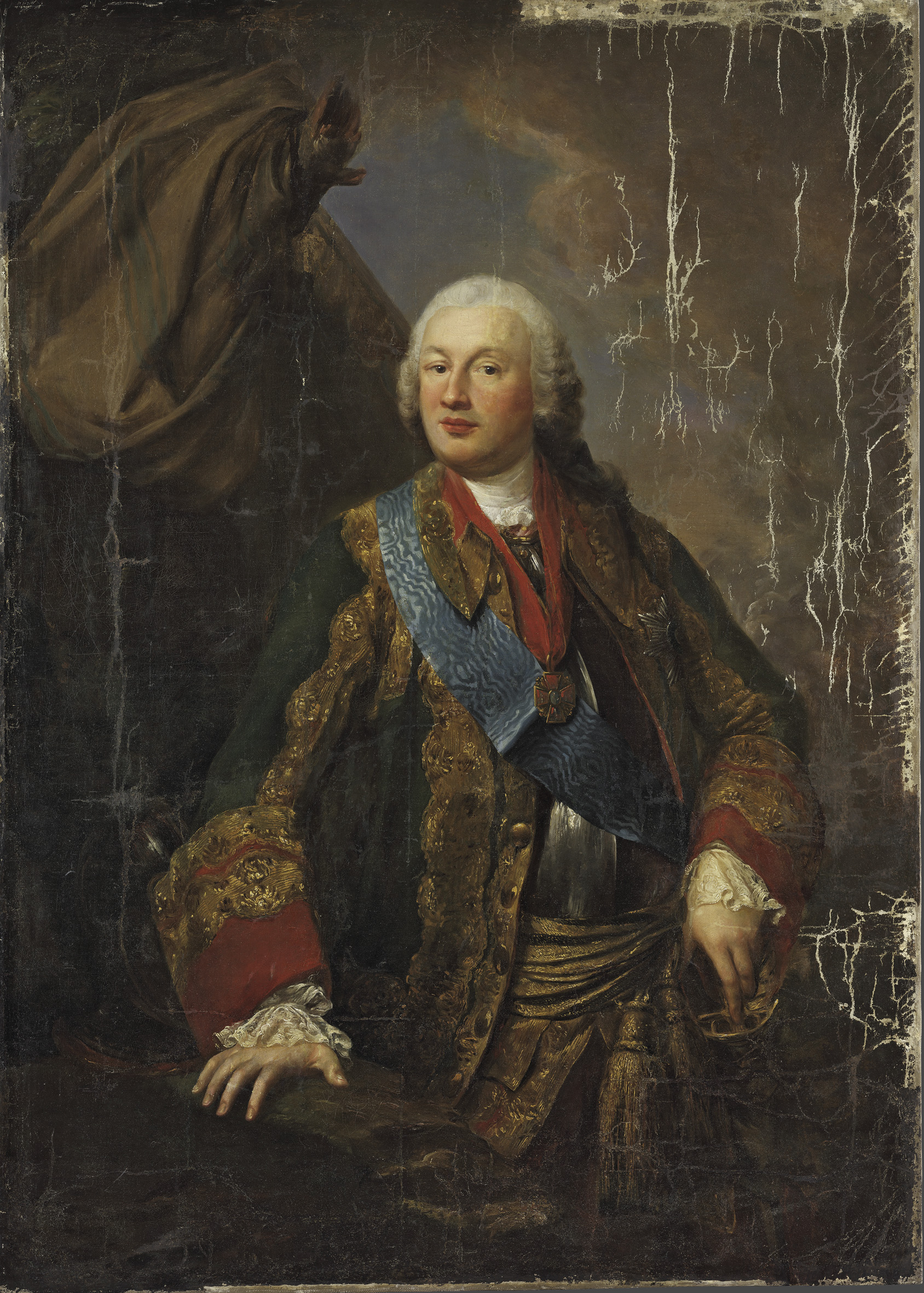 Неизвестный художник второй половины XVIII века. Портрет князя М.Н. Волконского.